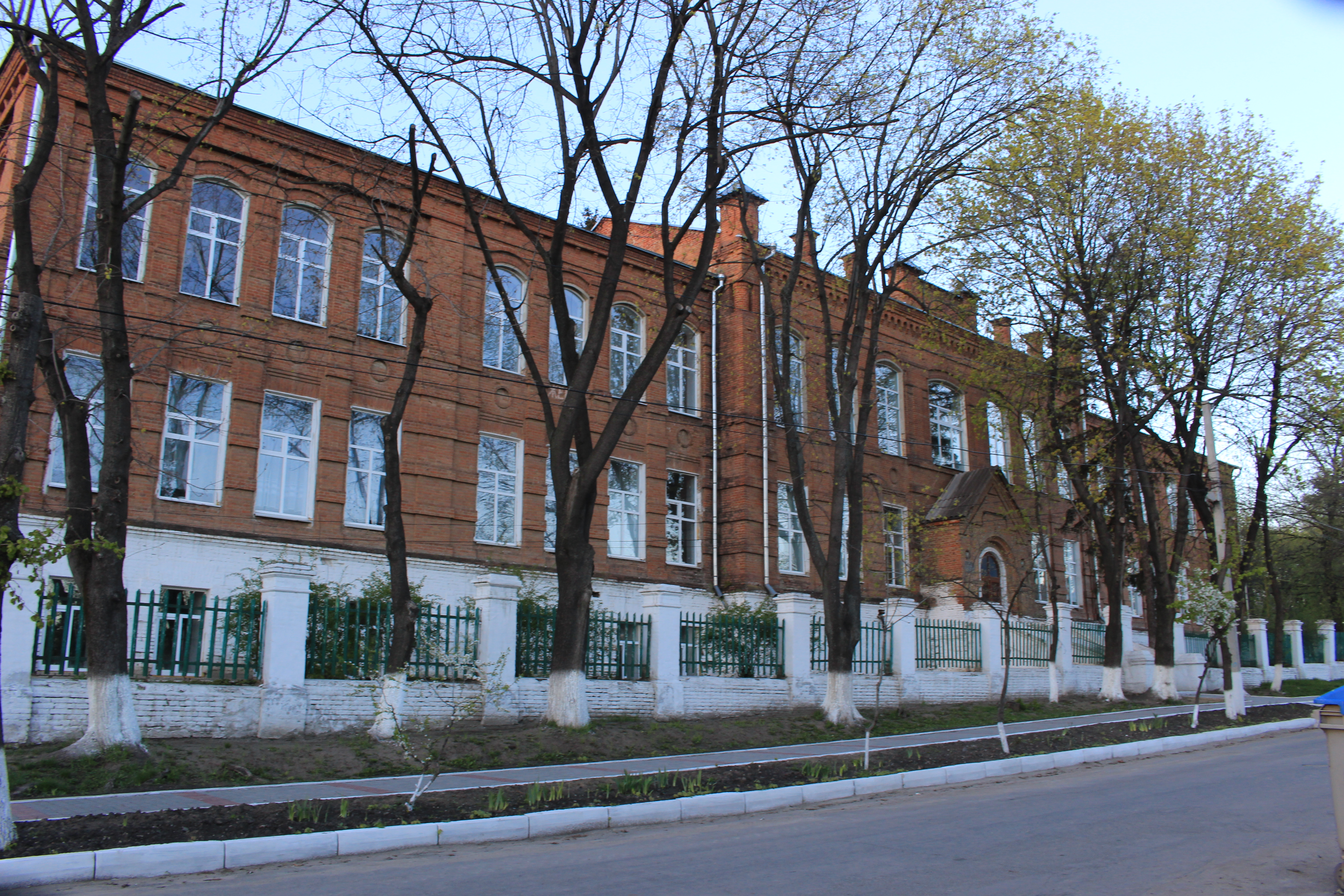 Гімназія (нині школа-інтернат № 1), Балта, вул. Шевченка, 16